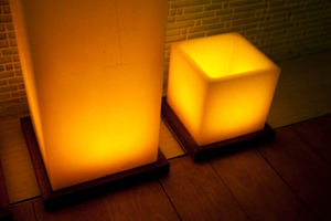 Photophore en paraffine